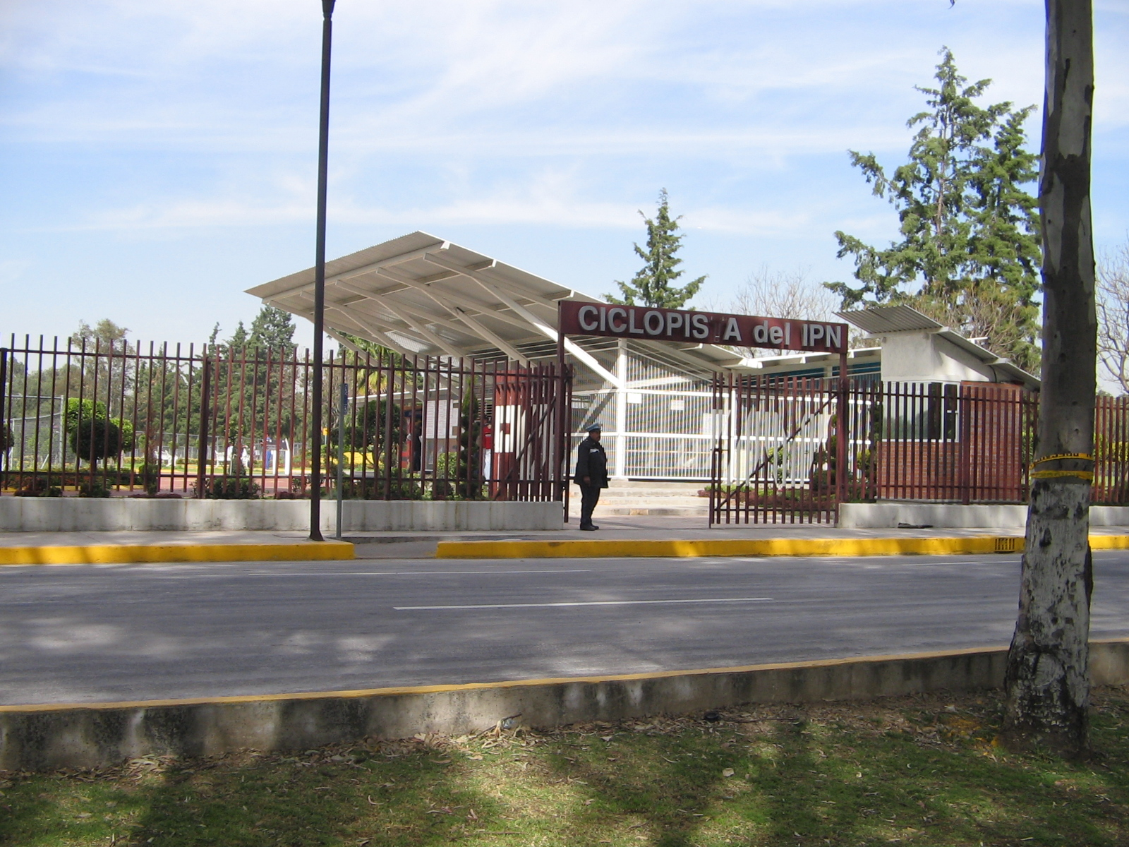 Entrada a la ciclopista del IPN